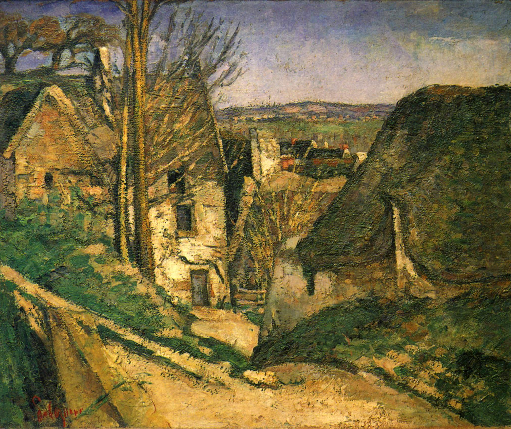 Das Haus des Gehenkten bei Auvers